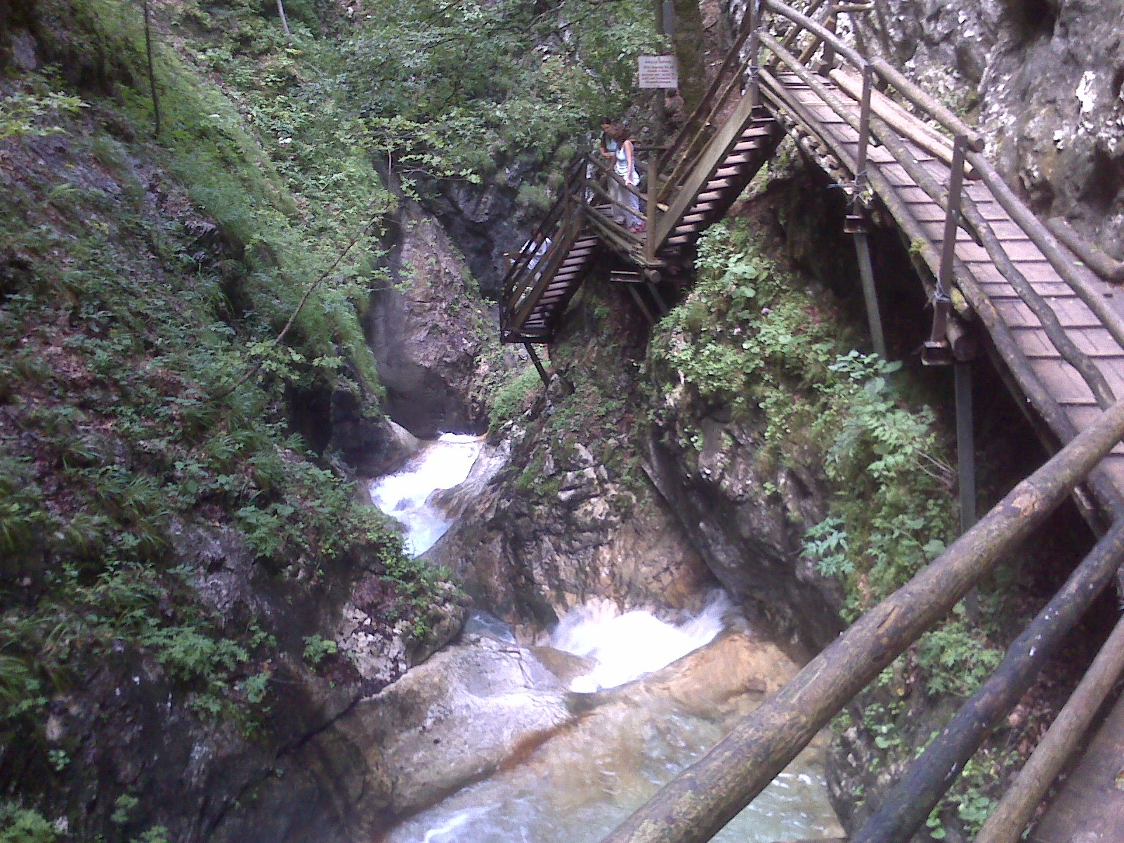 Dr. Vogelgesang-Klamm im Sommer 2009